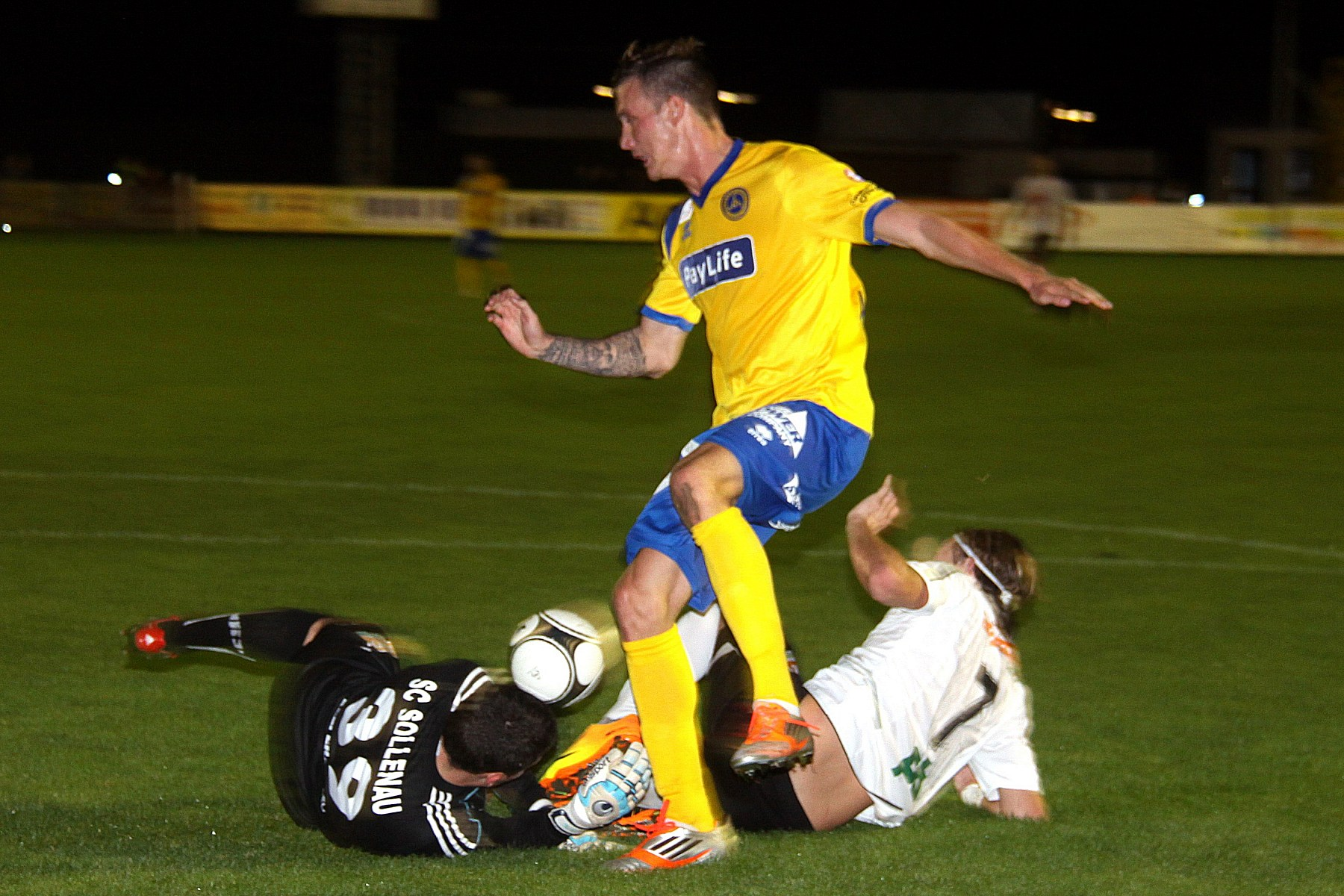 Österreichischer Fußball-Cup 2013/14 am 25. September 2013 – 1. SC Sollenau vs. First Vienna FC 0:4 (0:1) – Das Bild zeigt von links nach rechts Torhüter Marco Wusthoff (1. SC Sollenau), Alexander Aschauer (First Vienna FC, gelbes Trikot) und Jürgen Csandl (1. SC Sollenau, weißes Trikot).